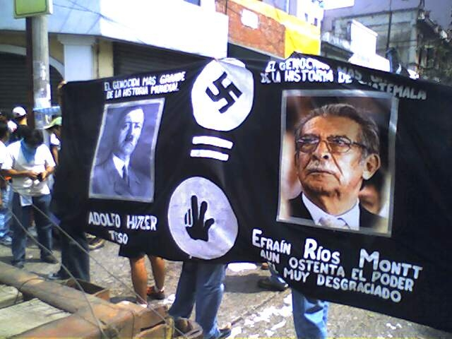 critica a rios montt huelga de dolores 2,006 universidad de san carlos 6ta ave y plaza vivar zona 1 guatemala city